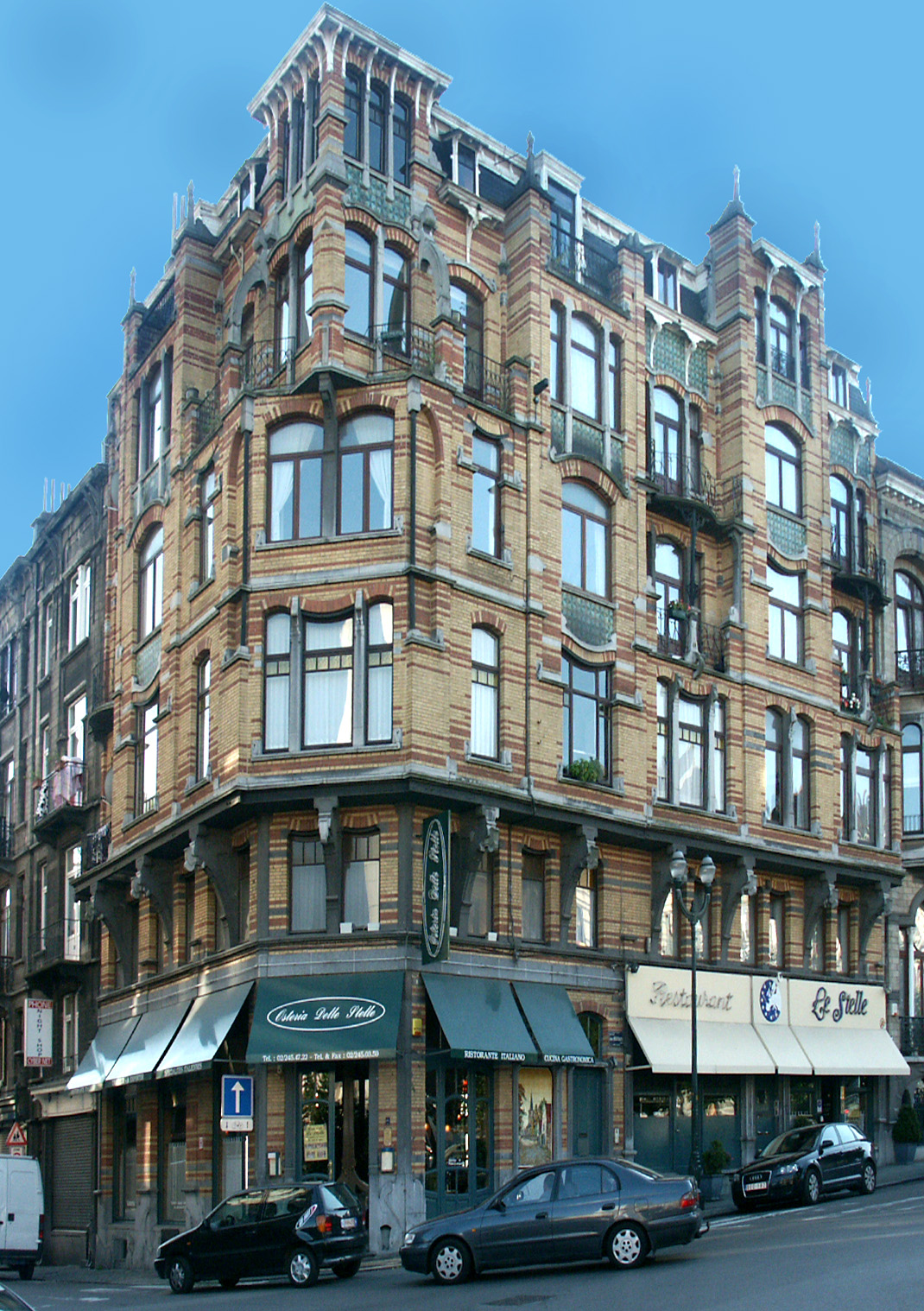 Gebouw van Gustave Strauven op de Louis Bertrandlaan 55-61